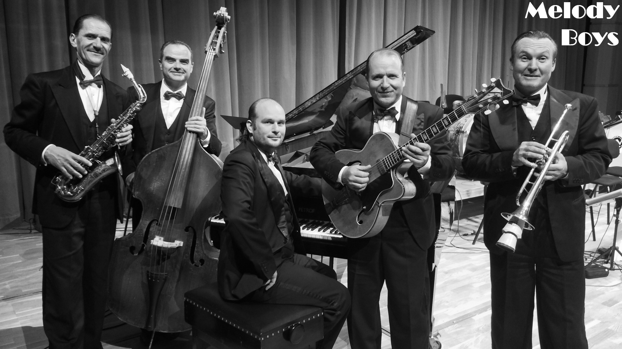 Melody Boys Band